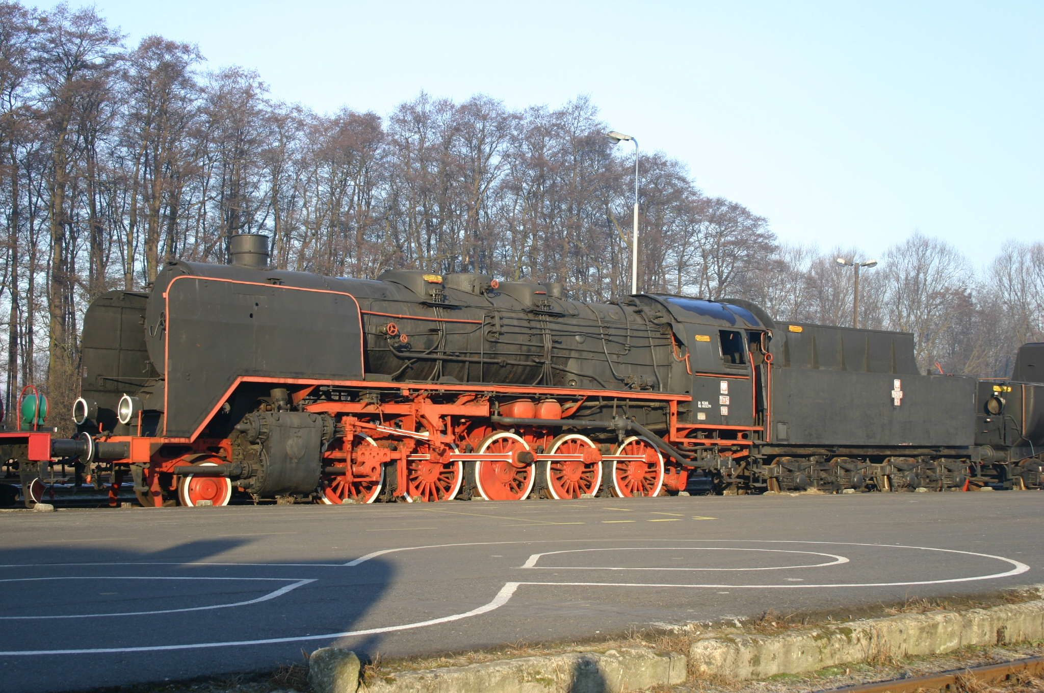 Dampflokomotive Ty 5-10, ex DRG 50 451 im Bahnbetriebswerk Wolsztyn